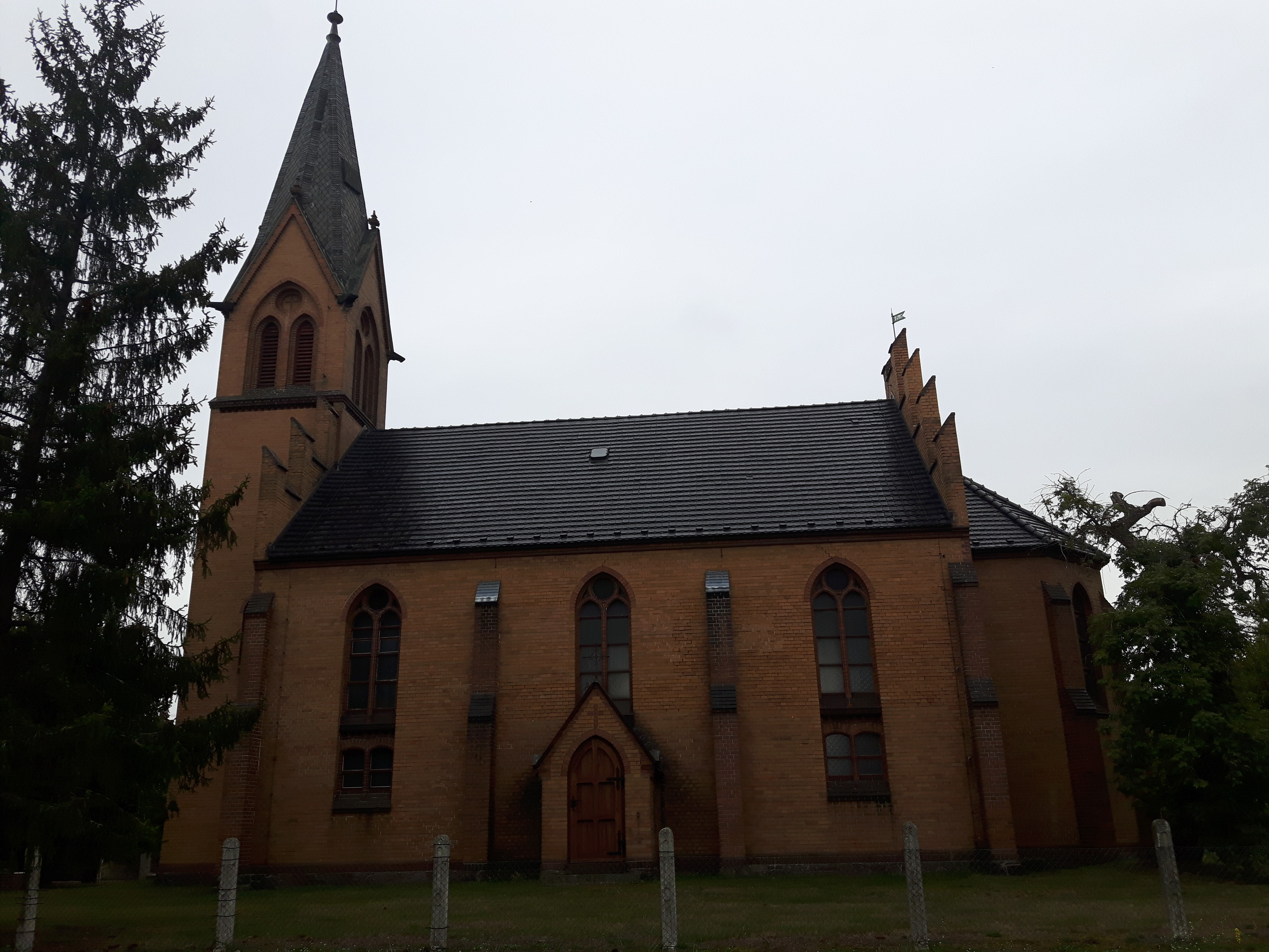 Dorfkirche Missen bei Vetschau in Brandenburg mit Eingangsportal an der Südseite.